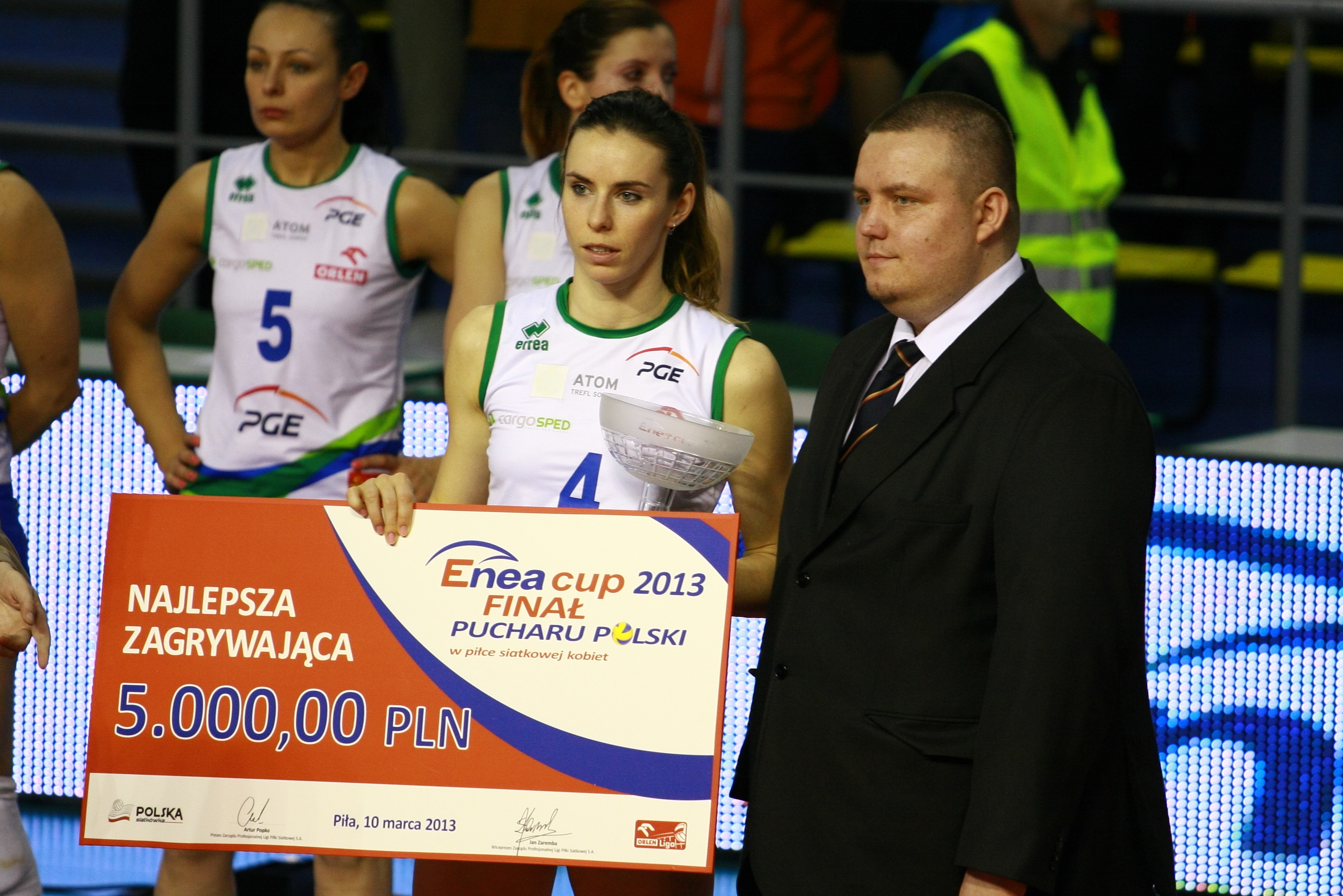 Atom Trefl Sopot Bank BPS Muszynianka Fakro Muszyna Tauron MKS Dąbrowa Górnicza Impel Gwardia Wrocław